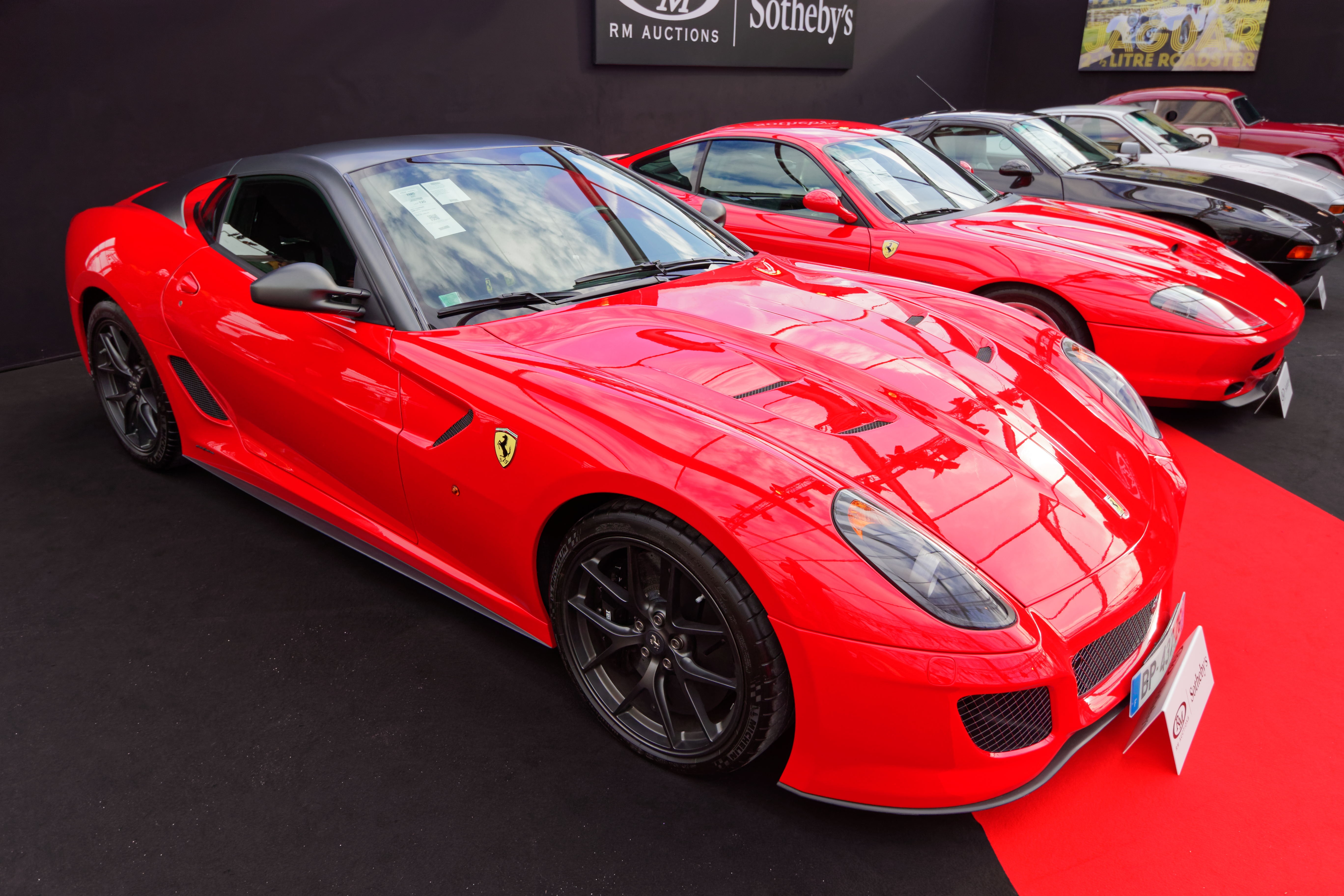 Une Ferrari 599 GTO de 2011 exposée lors de la vente RM Sotheby’s 2017 aux Invalides à Paris.